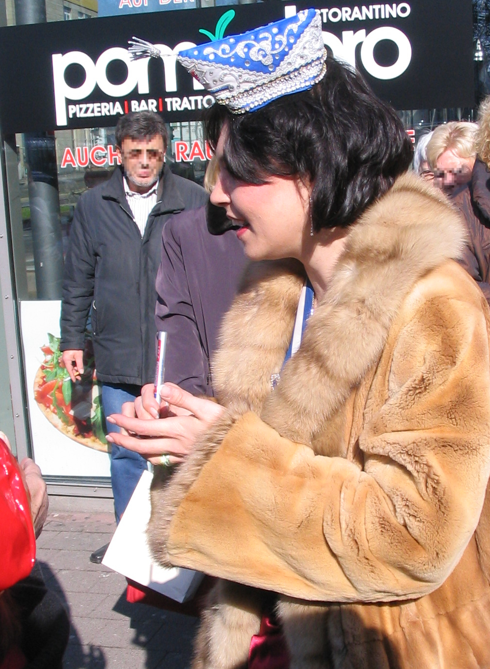 Die Düsseldorfer Karnevalsprinzessin Rebecca I. (Rebecca Frankenhauser) nach einem Besuch beim „Traumkino“ (Seniorenkino des Ufa-Palasts) in einem Samtnerzmantel mit kanadischem Goldzobel, gesponsert von der Firma Slupinski, Düsseldorf.